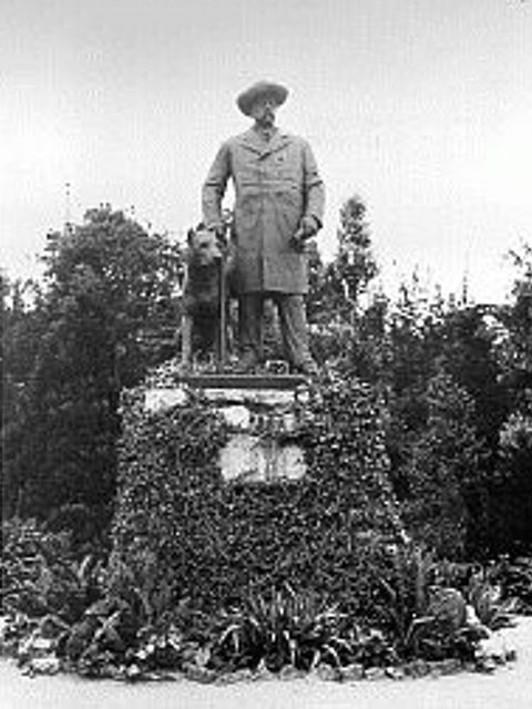 Pomnik Bismarcka z 1900 r.